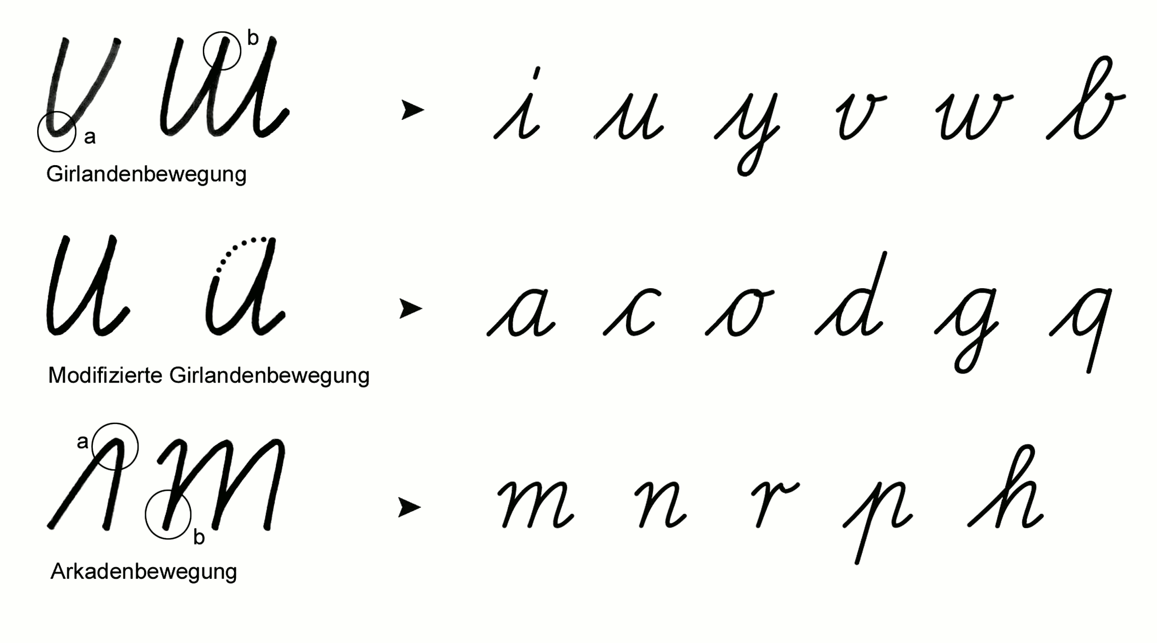 Dynamisierung der Bewegungsausführung durch verjüngte Bogen (a) und verkürzte Deckstriche (b)